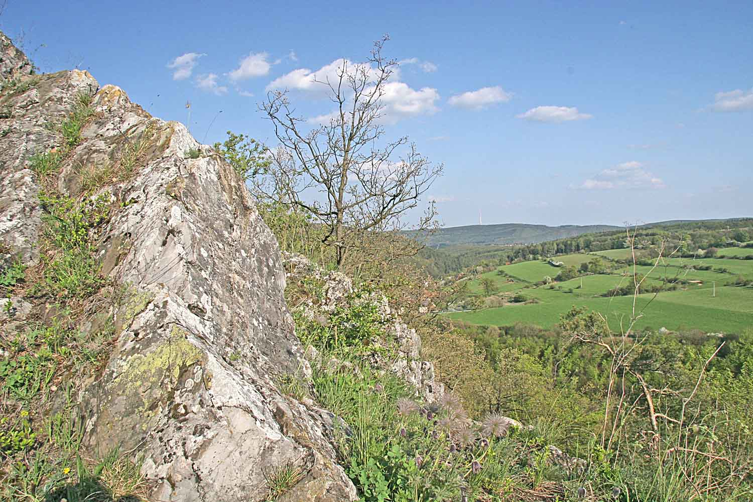 Přírodní rezervace Kulivá hora